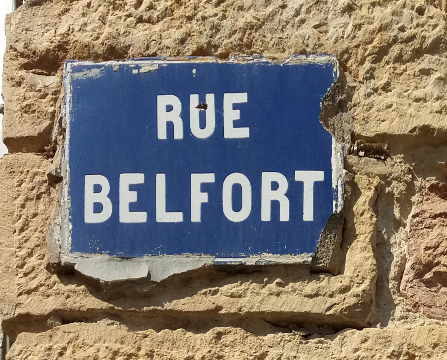 Plaque.